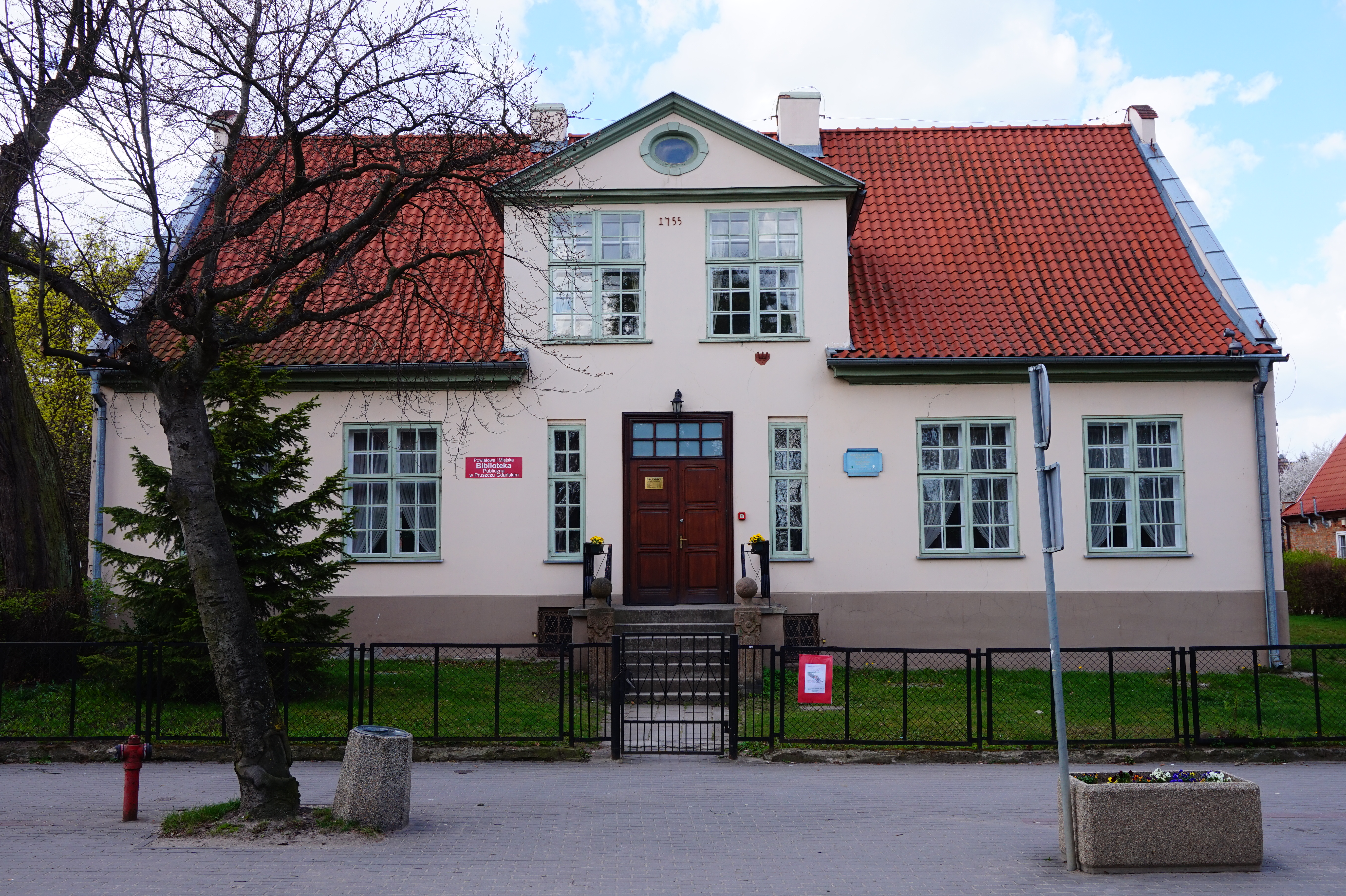 Dawna plebania kościoła p.w. Podniesienia Krzyża Świętego w Pruszczu Gdańskim